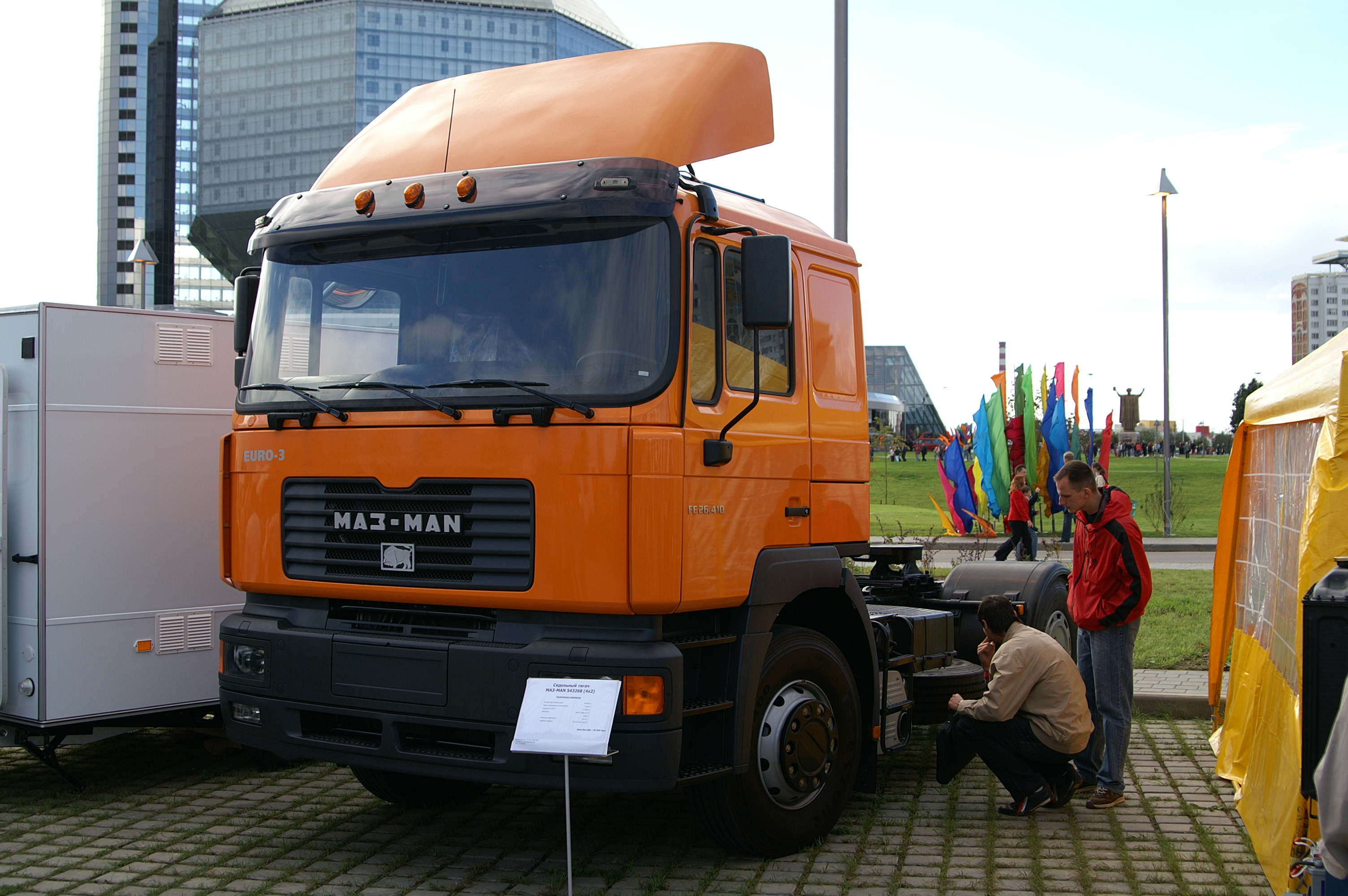 MAZ-MAN 543268 truck in Minsk